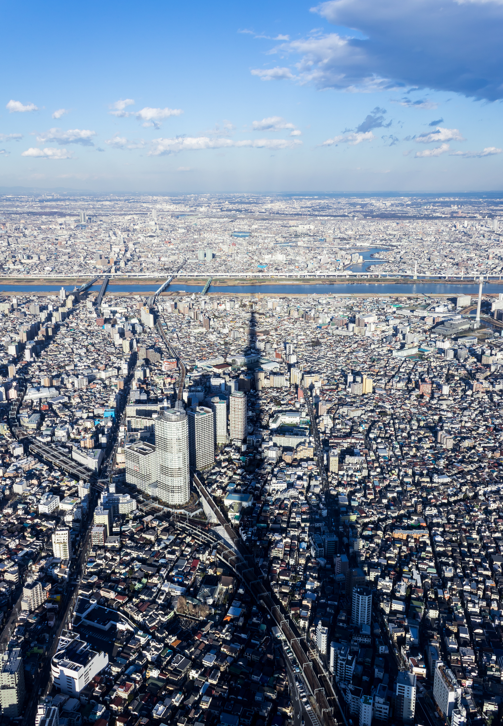 スカイツリーからの景色（スカイツリーの影）